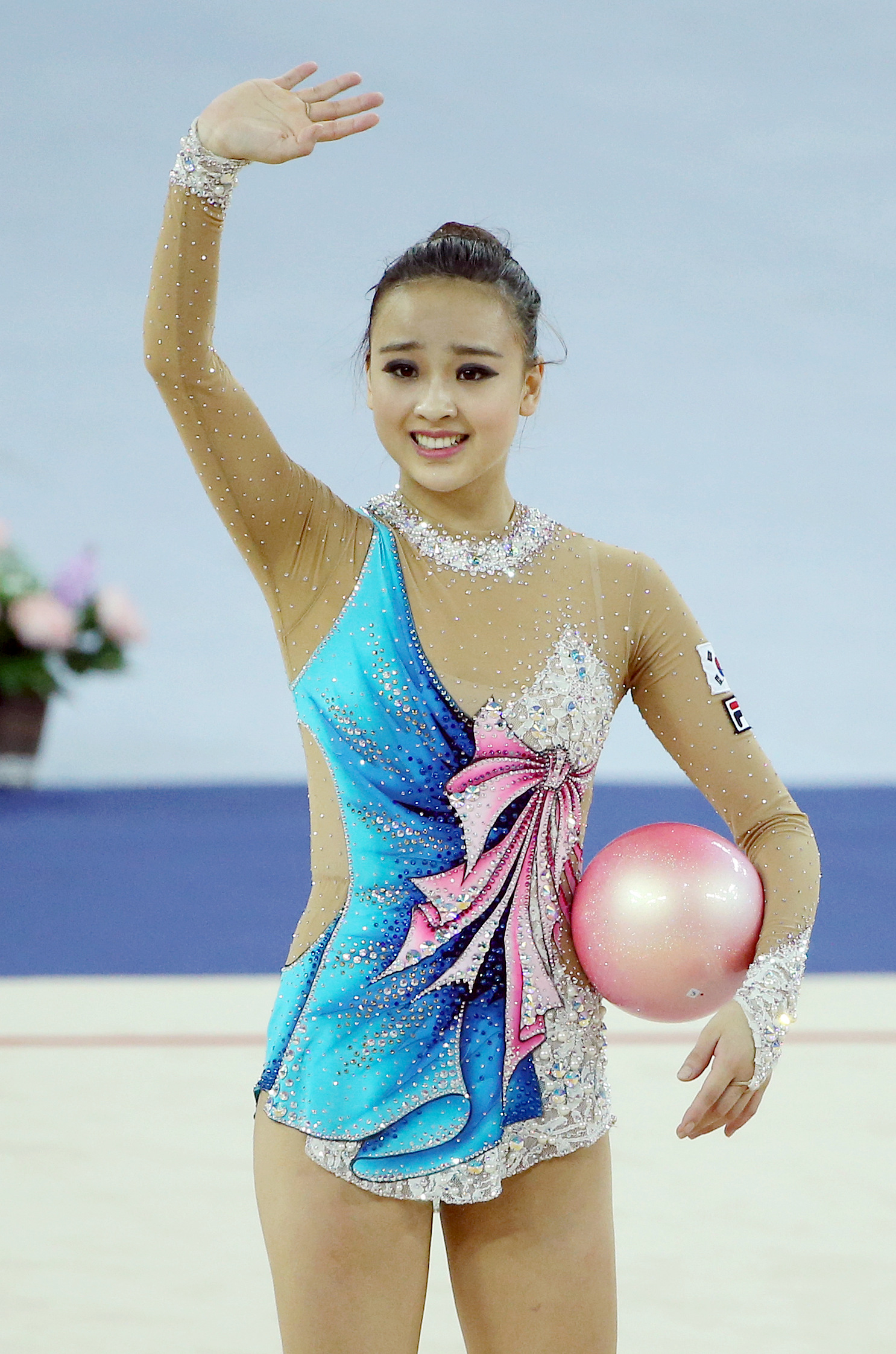 2014인천 아시아경기대회리듬체조손연재가 2일 인천시 남동체육관에서 열린 ‘2014 인천 아시아경기대회’ 리듬체조 개인전 결승에서 후프 연기를 펼치고 있다.2014-10-02남동체육관, 인천시문화체육관광부해외문화홍보원코리아넷전한